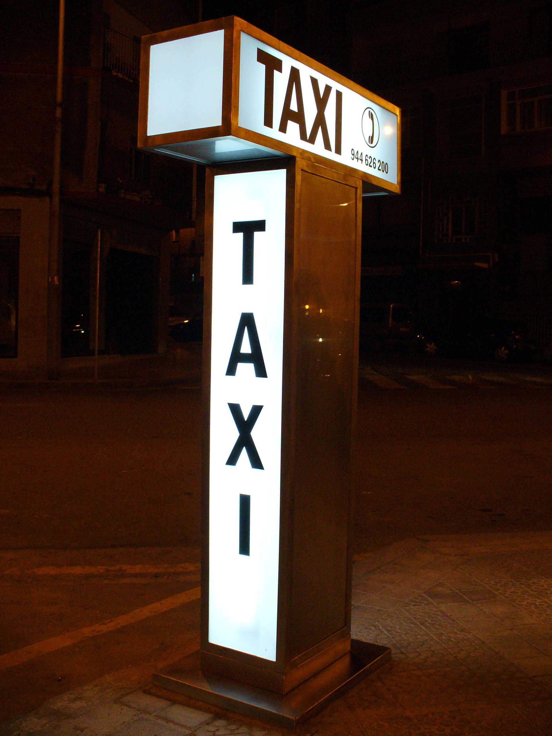 Escultura funcional en Kabiezes (Santurtzi)